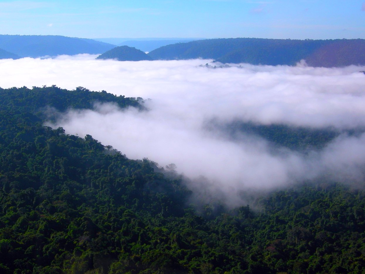 Neblina amazônica